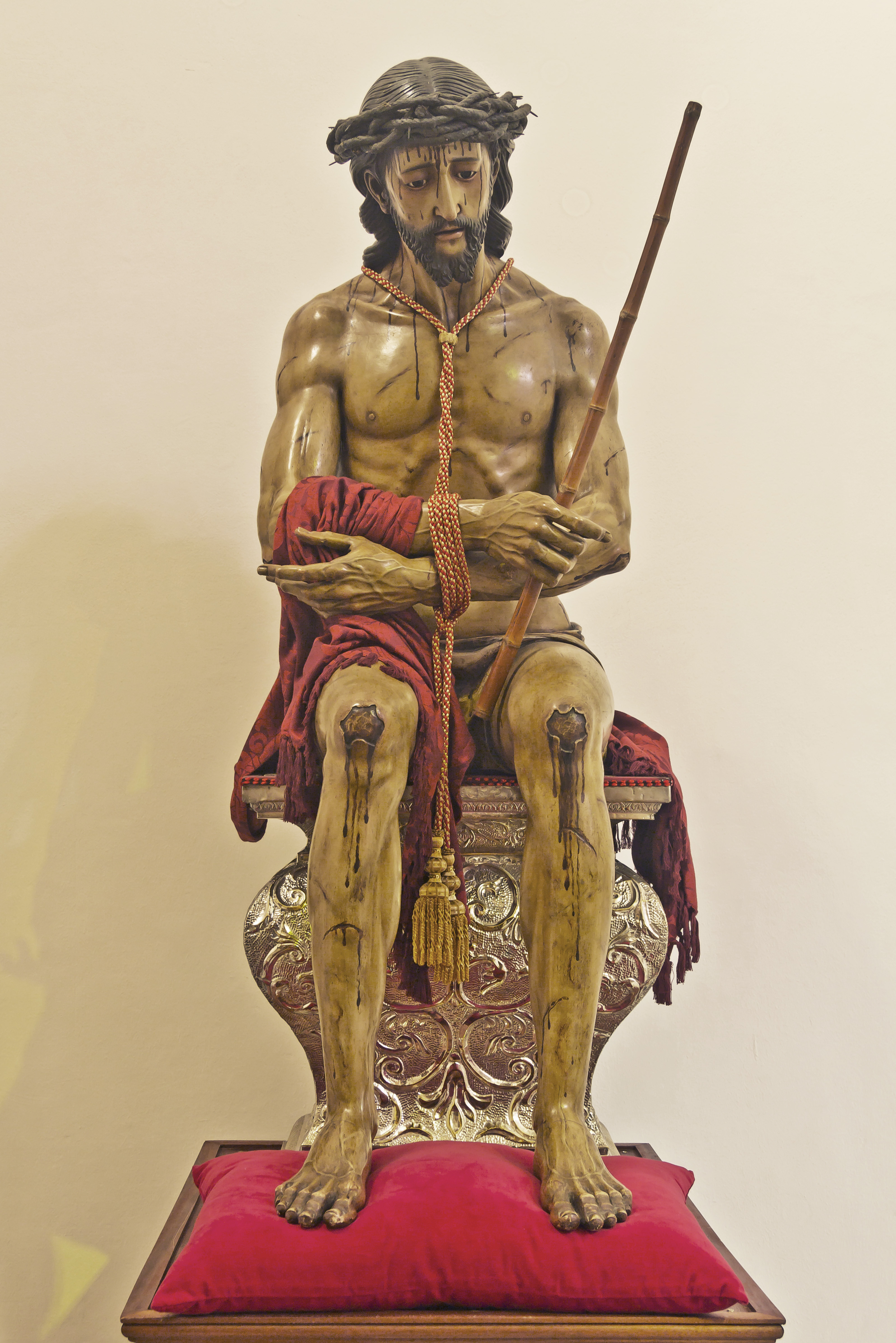 El Señor de la caña en la Catedral de La Laguna